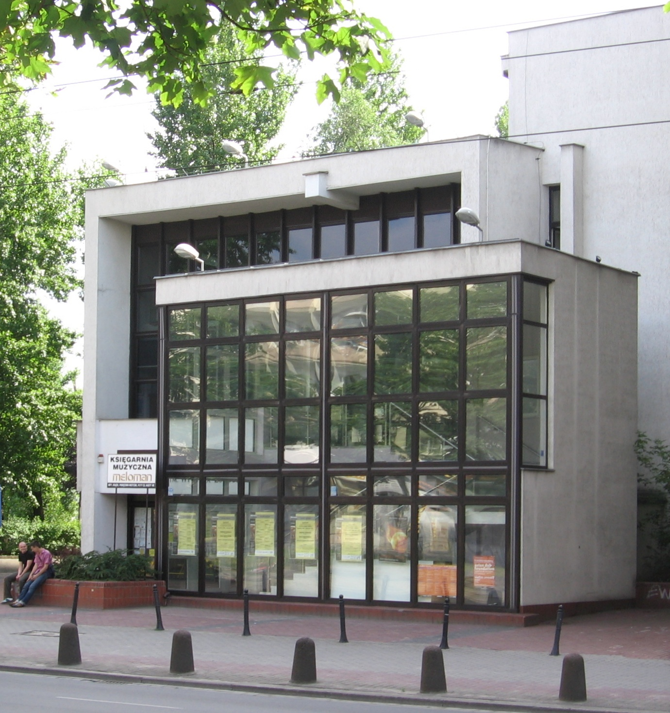 Wrocław, Poland - philharmonic